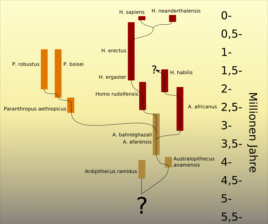 „Stammbaumhypothese zur Entwicklung des Menschen unter Berücksichtigung klima- und biogeographischer Überlegungen“, angelehnt an die Interpretation der gegenwärtigen Fundlage durch Prof. Friedemann Schrenk; in: Friedemann Schrenk, Die Frühzeit des Menschen. Der Weg zu Homo sapiens, Verlag C. H. Beck, 1997 und 2003, S. 122.